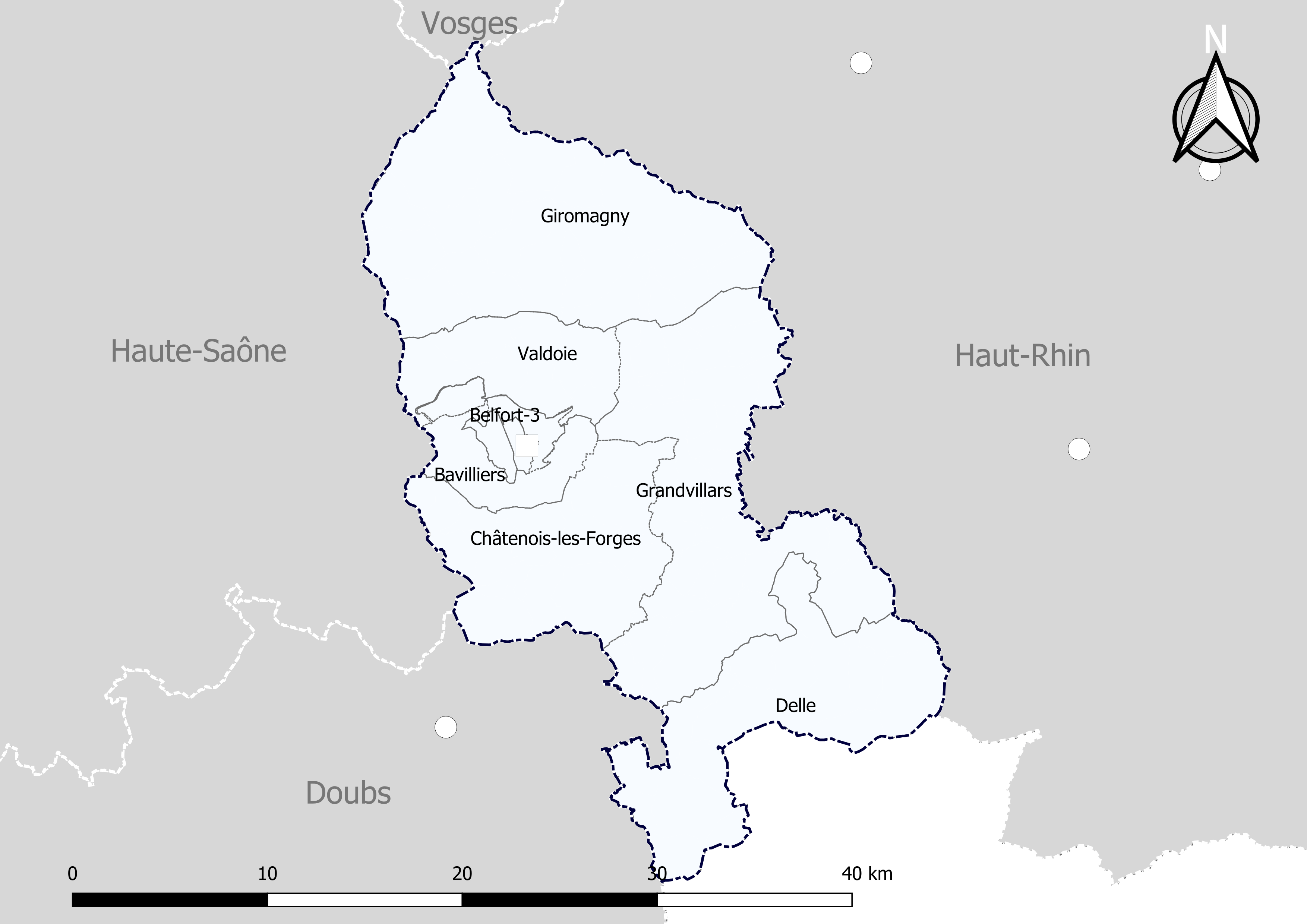 Carte du découpage cantonal du département du Territoire de Belfort (France) - Carte arrêtée au 1er janvier 2019.